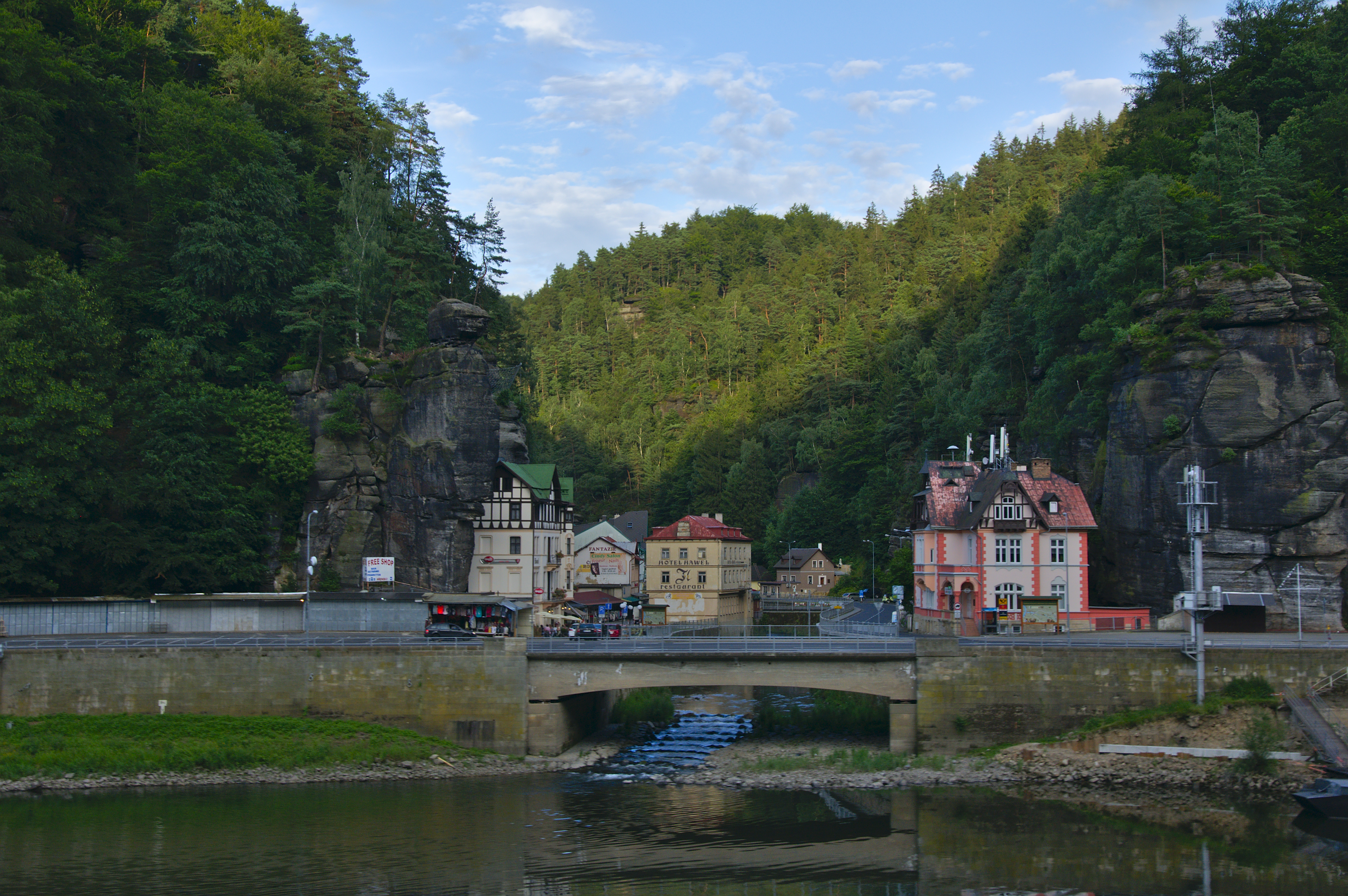 Hřensko, okres Děčín